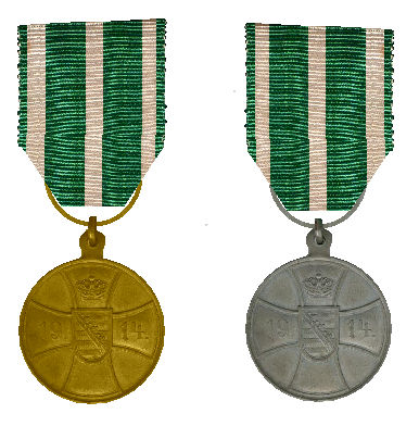 Tapferkeitsmedaille Sachsen-Altenburg 1915